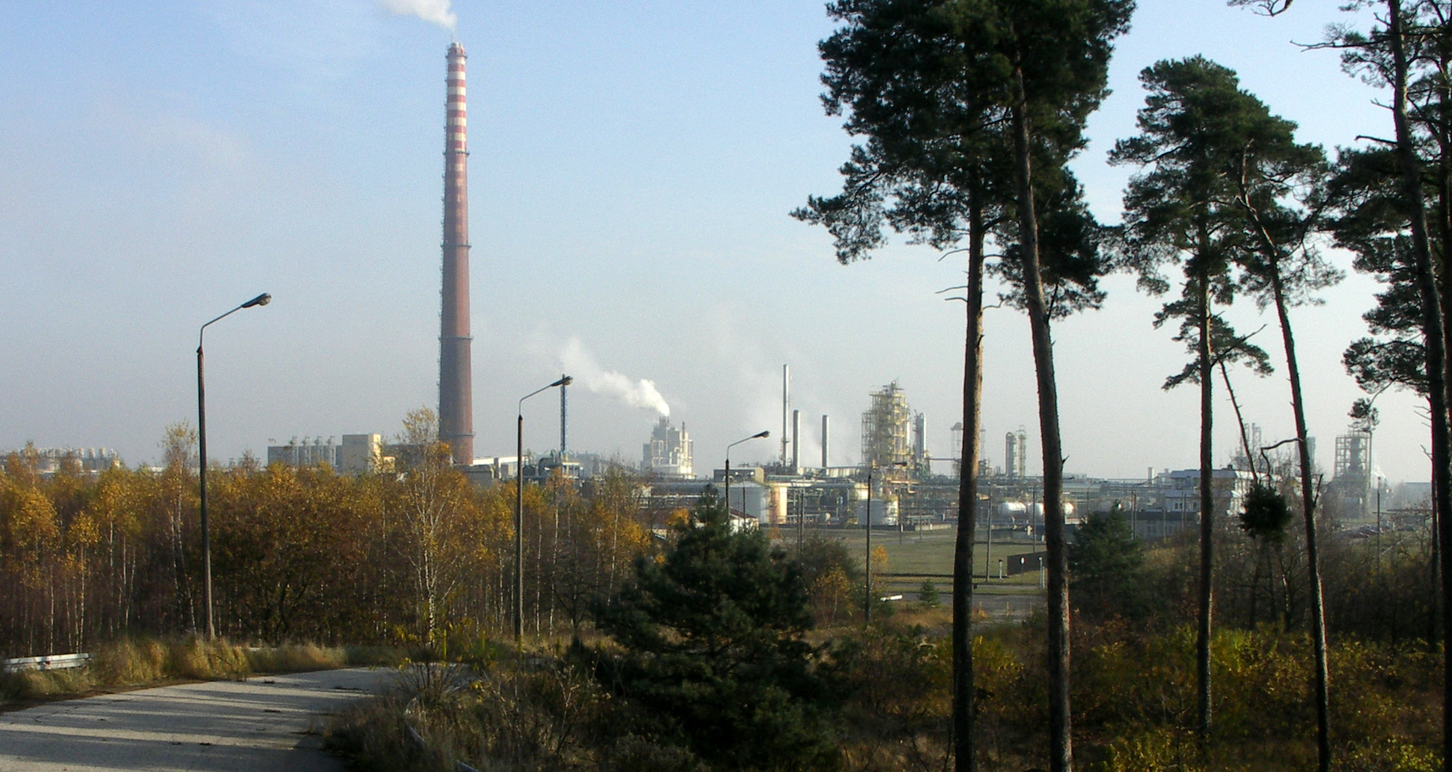 Fragment Zakładów Chemicznych Anwil S. A.